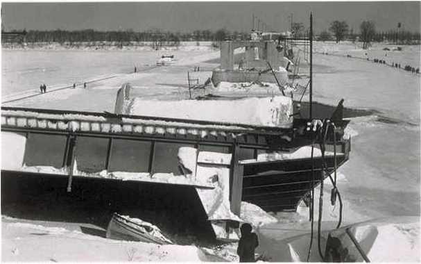 Pont Duplessis effondré à Trois-Rivières en 1951